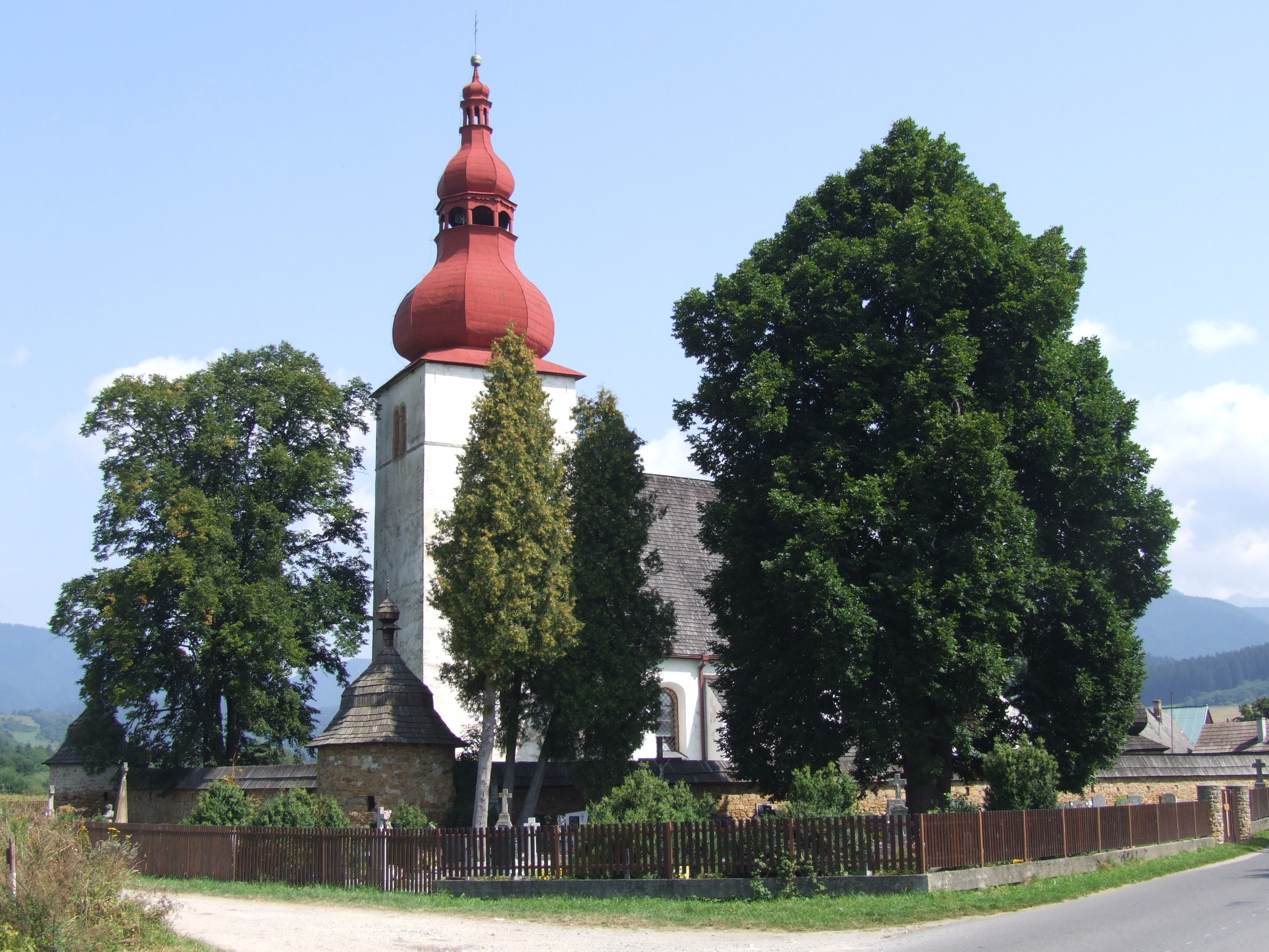 Liptovské Matiašovce kostol